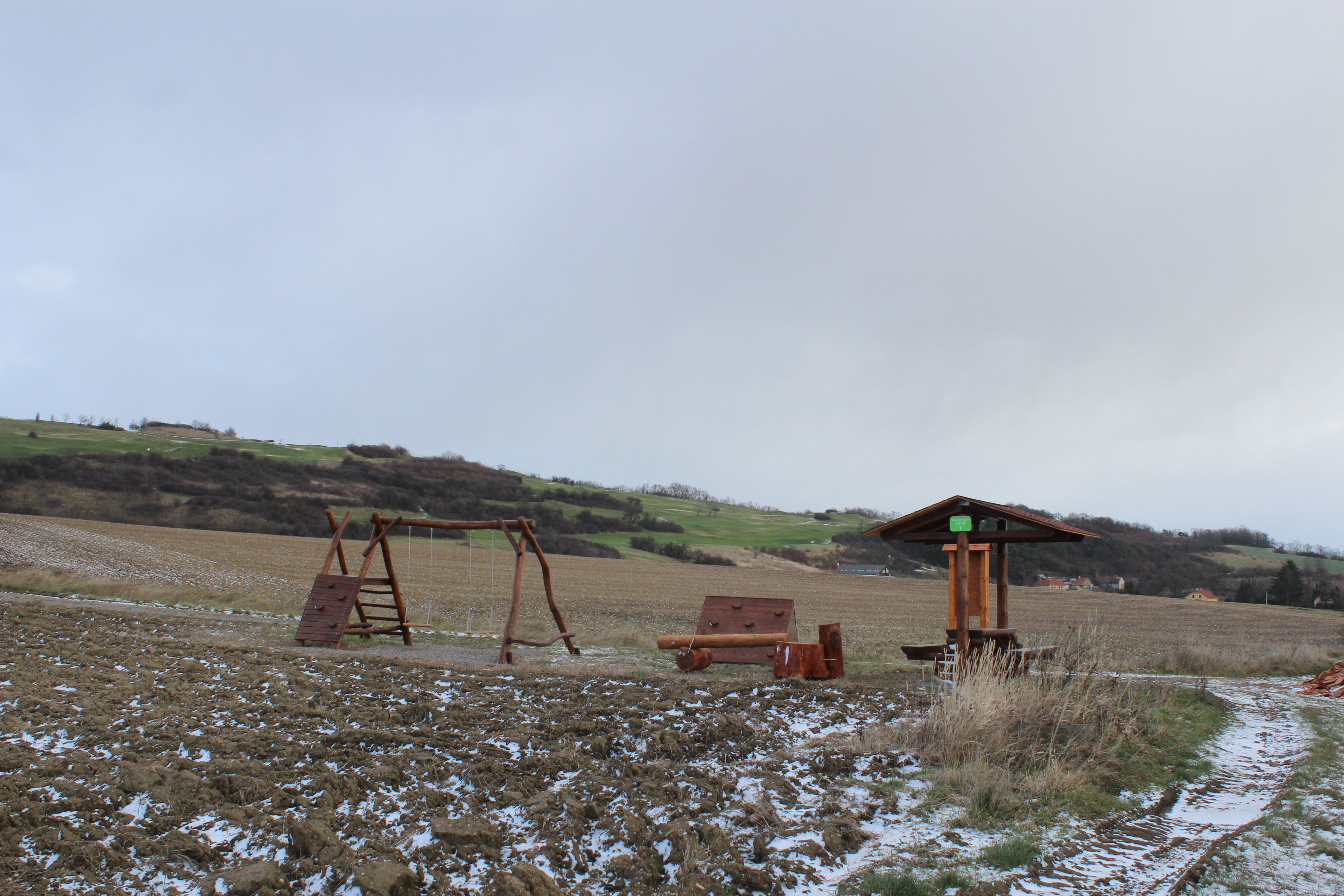 Pískovna Běleč - informační panel, lavičky s přístřeškem a dětské hřiště Naučné stezky Liteň u pískovny v Bělči – zelená stezka [1]